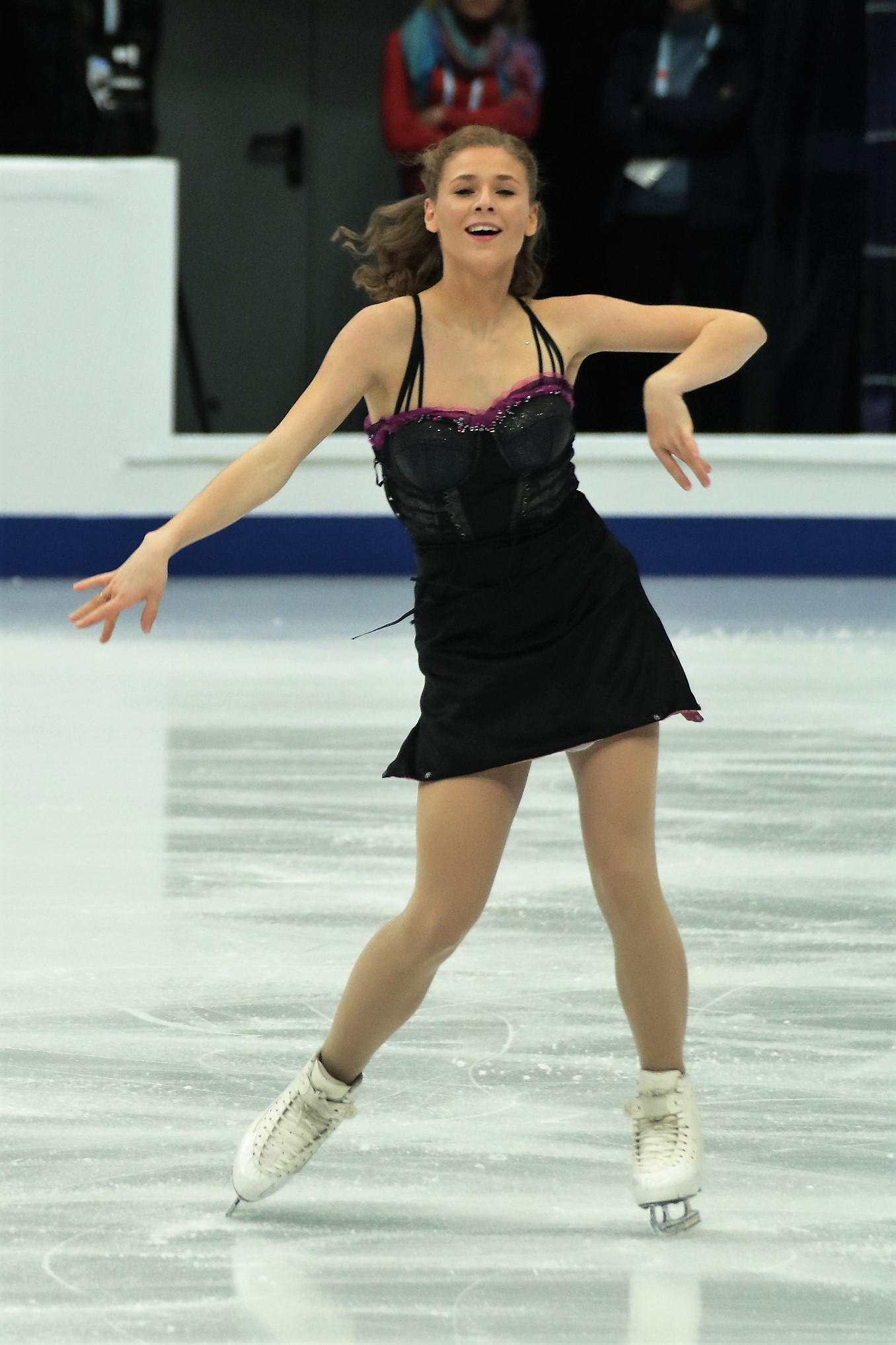 Лорен Лекавалье (Франция) на Чемпионате Европы по фигурному катанию 2018.